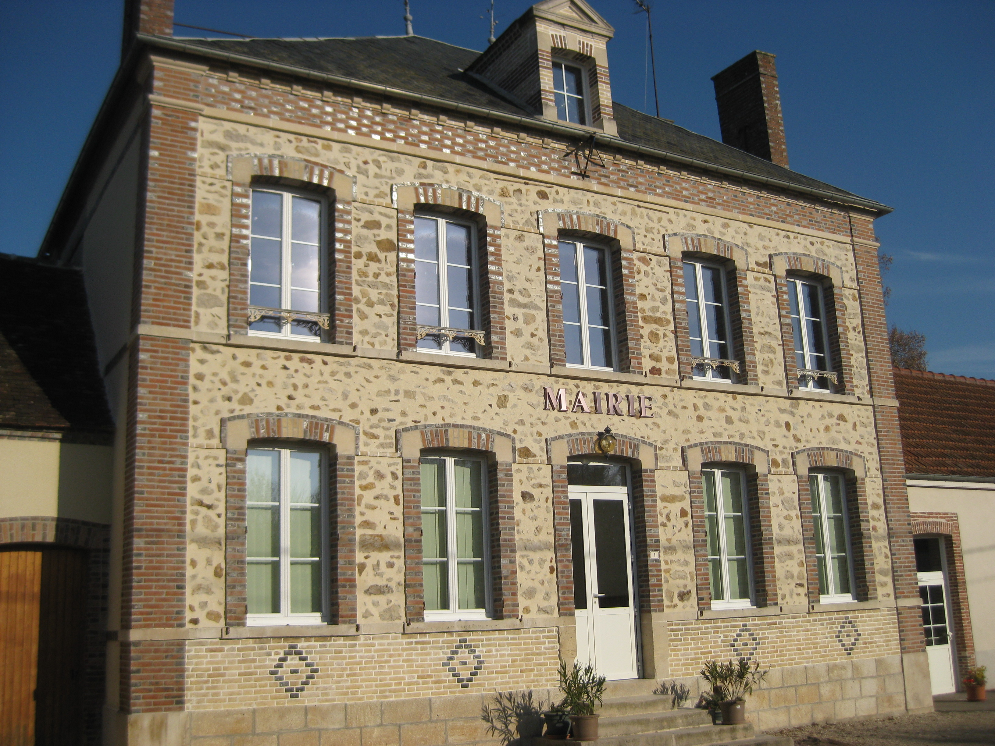 mairie